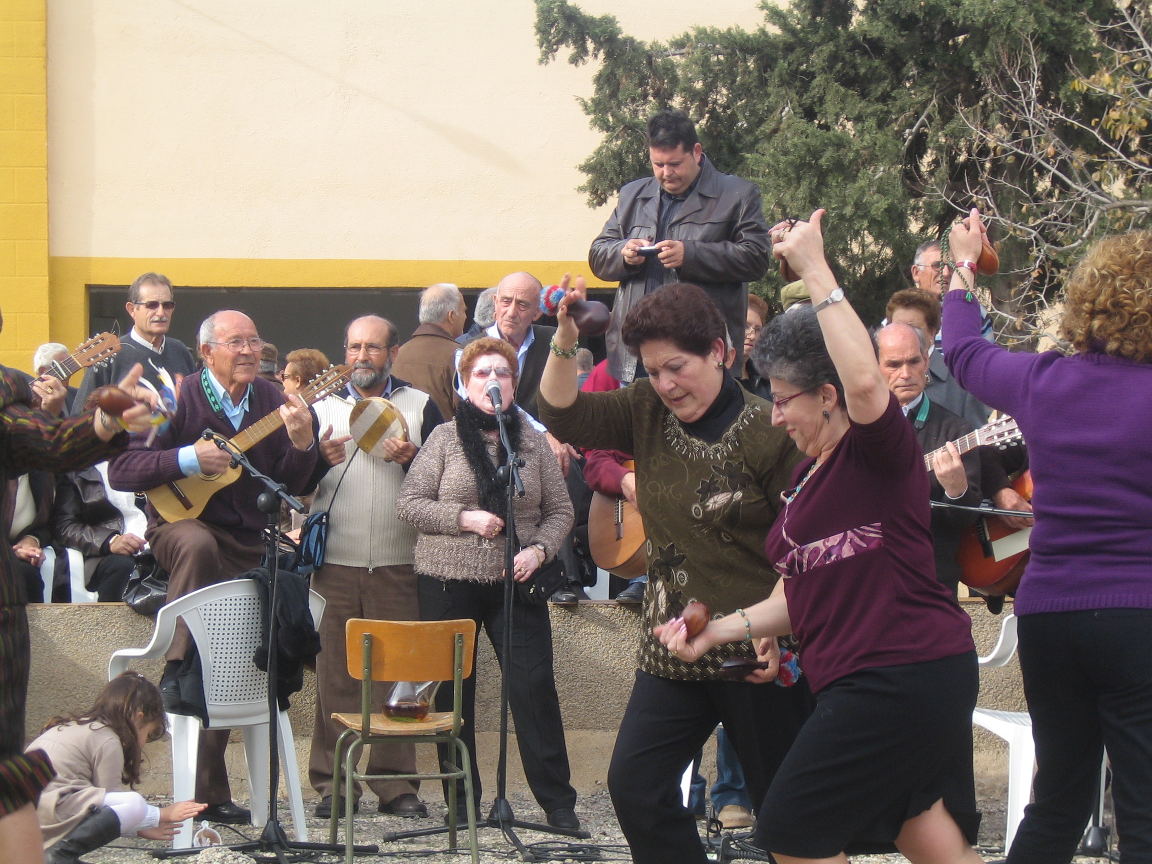 Cante y baile de unas parrandas interpretadas por la tradicional Cuadrilla de la Zarzadilla de Totana (Tierras Altas de Lorca) durante el Encuentro de Cuadrillas de Aguaderas de 2008.